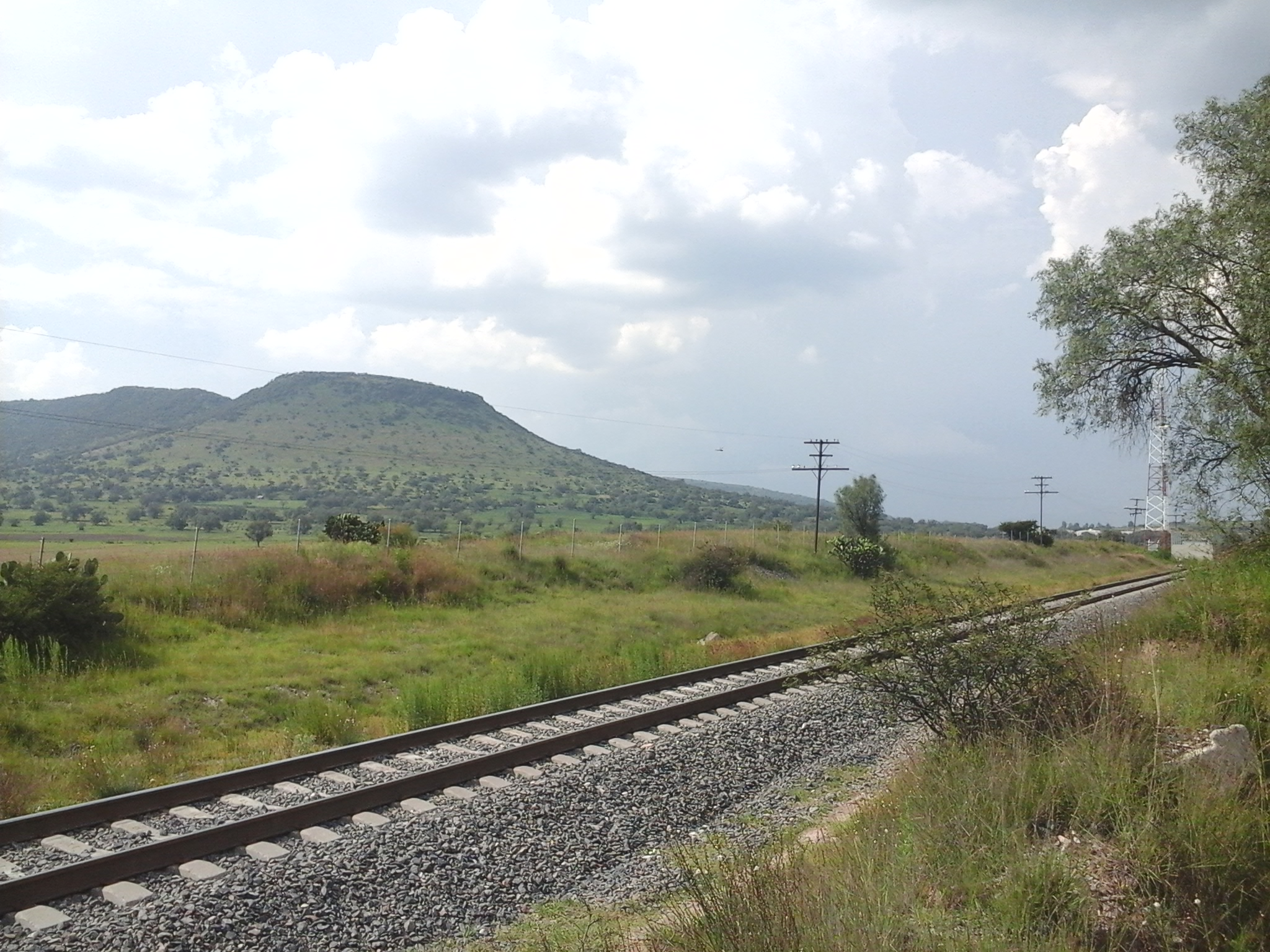 Ferrocarril México - Laredo